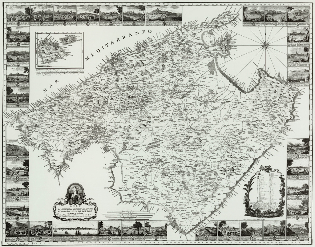 Mapa de Mallorca del Cardenal Despuig